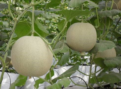 Hình chụp dưa lưới tại Khu Nông nghiệp Công nghệ cao TP. Hồ Chí Minh tháng 02/2014